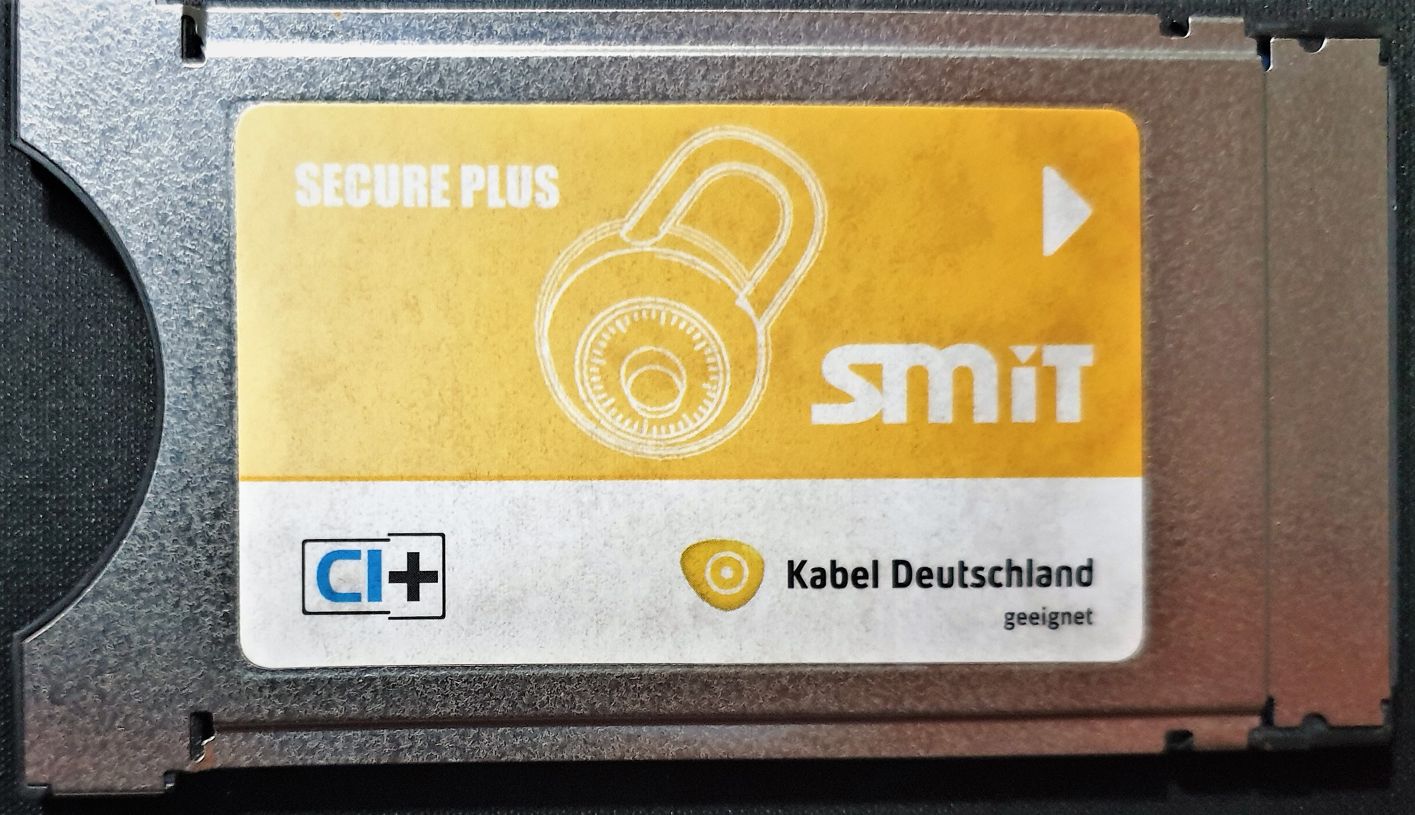 Common Interface Module CI+ von SMiT (Hongkong) für Smartcards von Kabel Deutschland (DVB-C) aus dem Jahr 2014 (Vorderseite) mit dem Zugangsberechtigungsschutz VideoGuard von NDS (heute Cisco Videoscape). Sogenanntes Simulcrypt-Verfahren mit Smartcards von Nagravision.